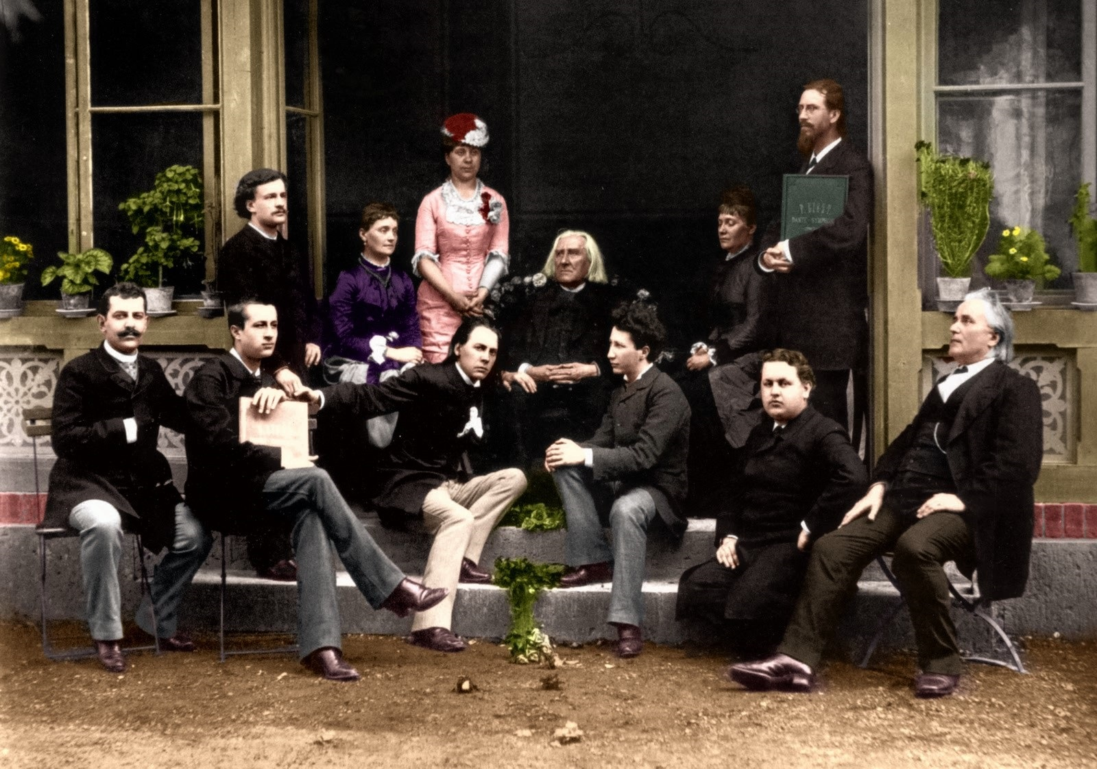 Franz Liszt with his pupils. 1st row: Saul Liebling, Alexander Siloti, Arthur Friedheim, Emil von Sauer, Alfred Reisenauer, Alexander Gottschalg. 2nd row: Moriz Rosenthal, Viktoria Drewing, Alexandrine Paramanoff, Franz Liszt, Annette Hempel-Friedheim (A. Friedheim's mother), Hugo Mansfeldt